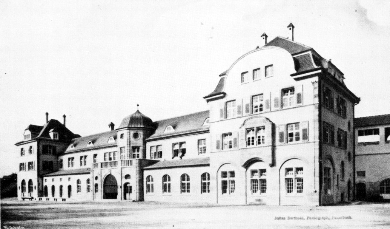 dritter Bahnhof in Feuerbach kurz nach seiner Fertigstellung